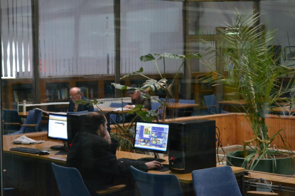 Билбиотека